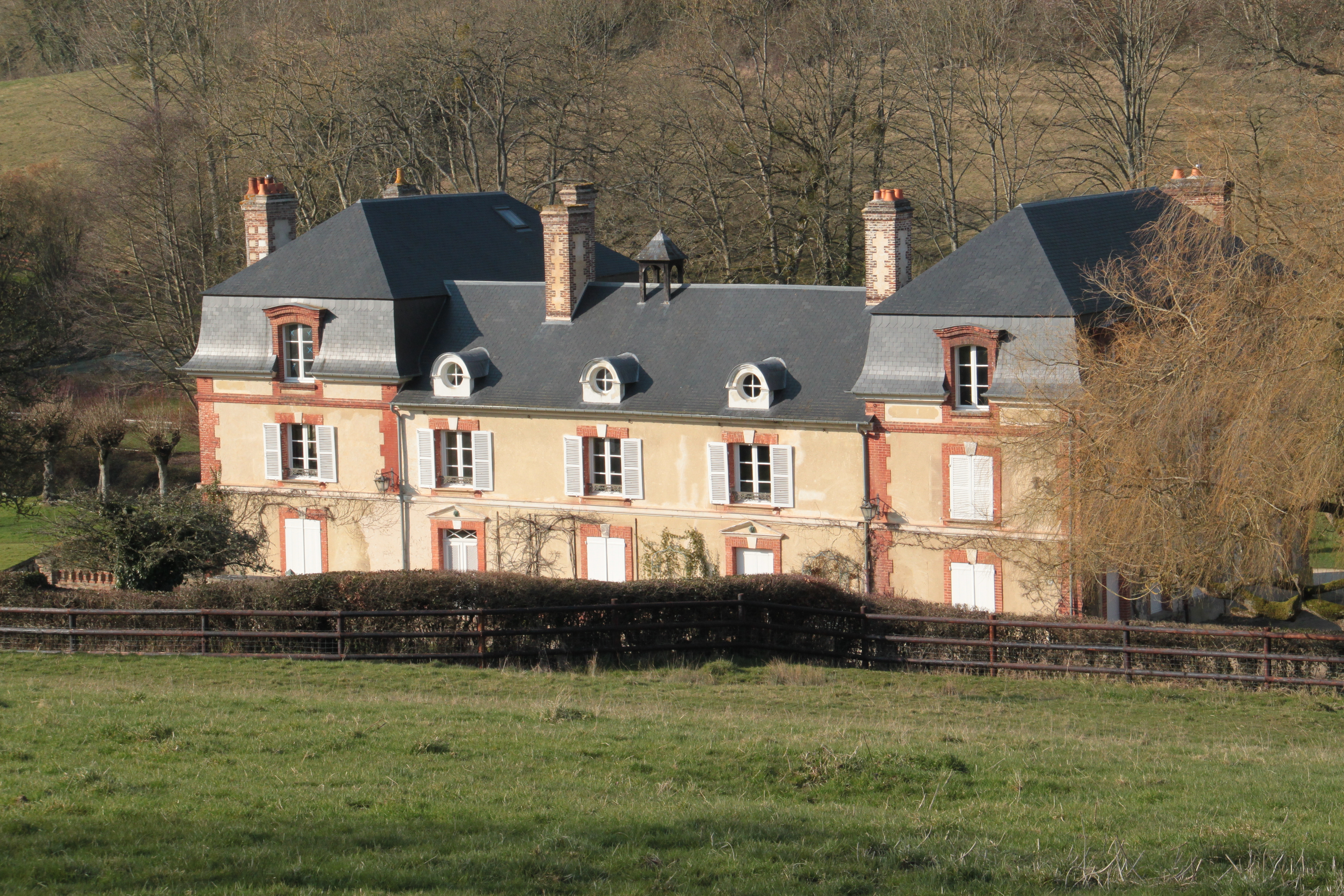 manoir du Mesnil-Germain (Calvados), France ; XVIIe siècle.